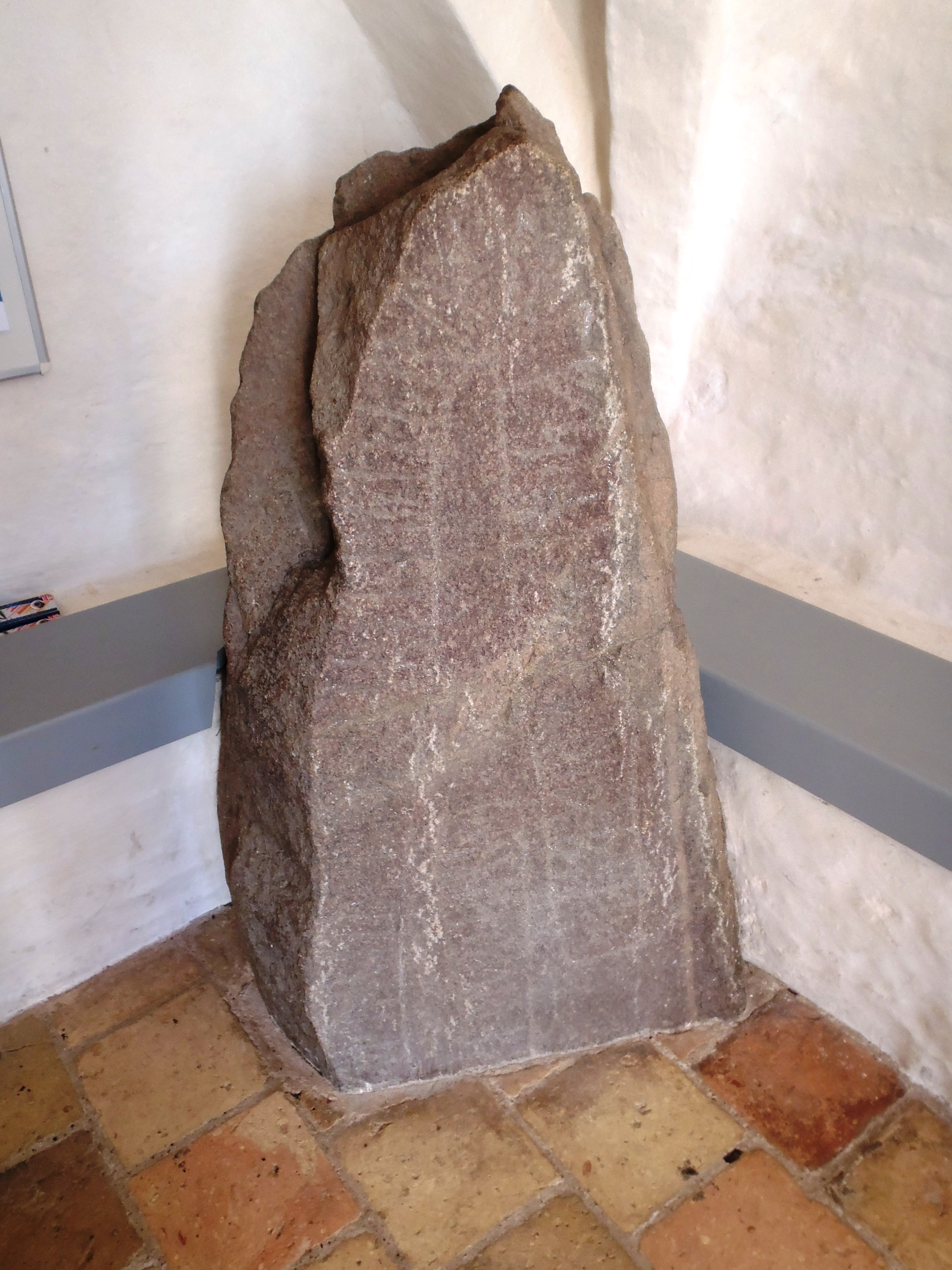 Hune Kirke